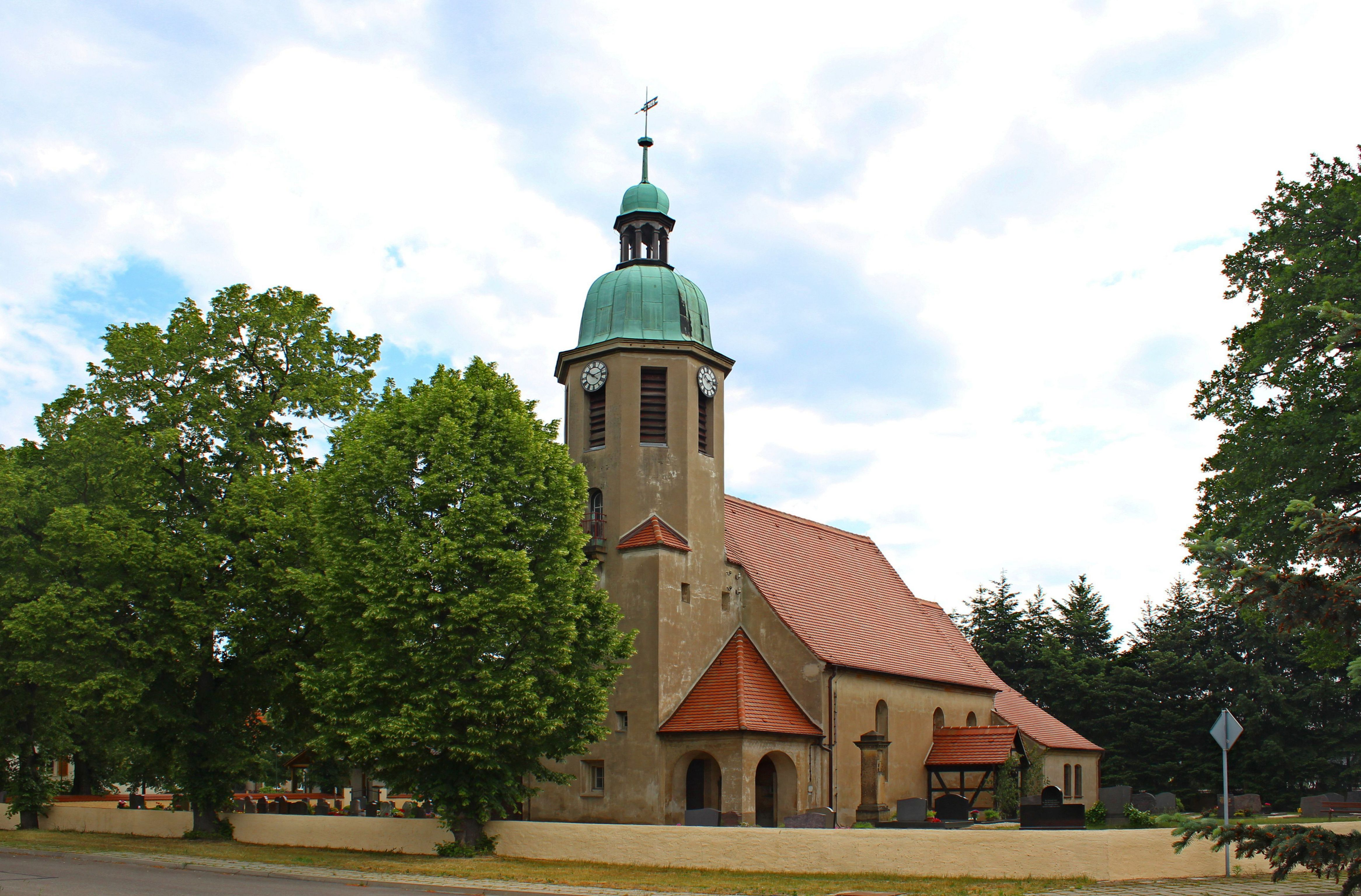 Dorfkirche Stolzenhain an der Röder